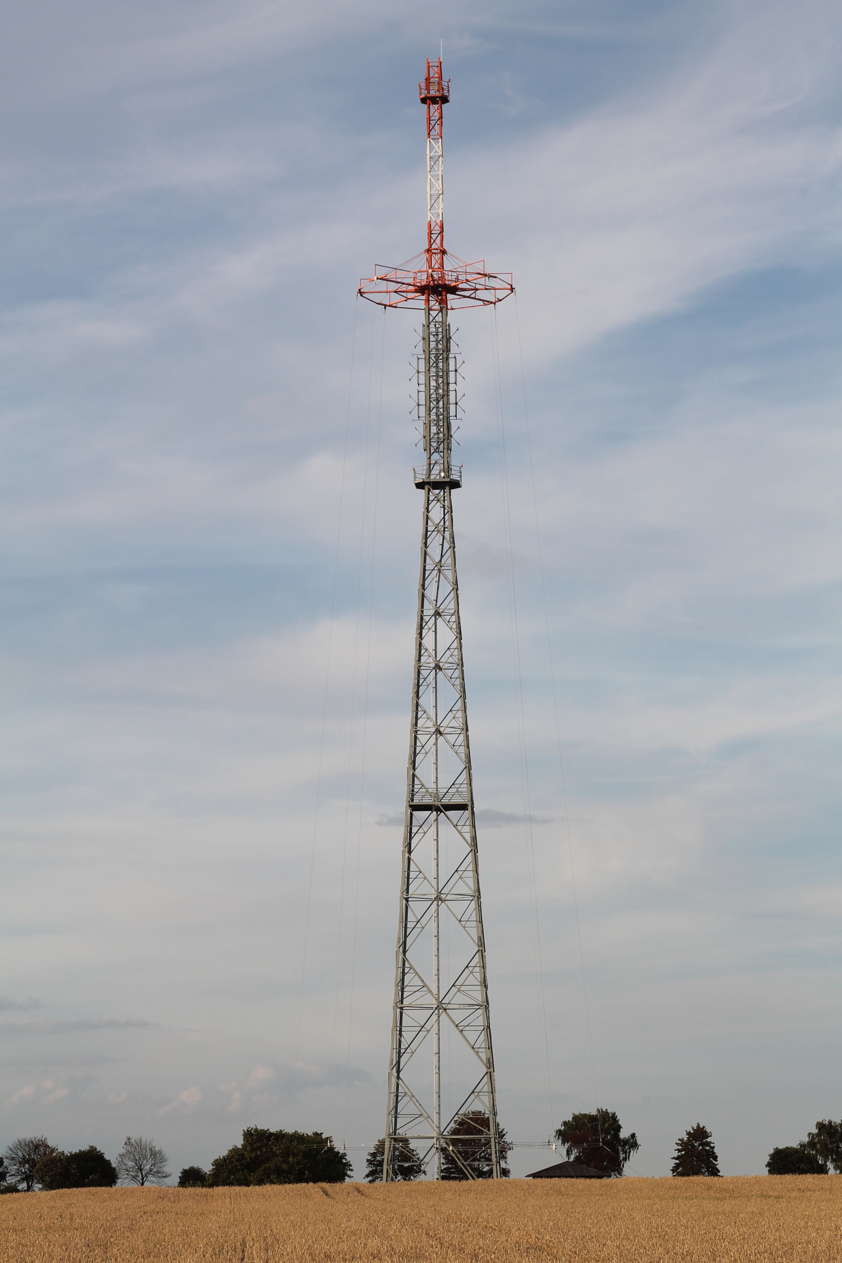 Sendeturm des Rheinsenders